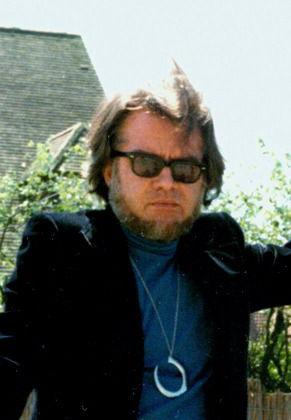 Herman Le Compte (Aalst, 26 april 1929 – Knokke, 3 januari 2008) was een Vlaams arts. Hij werd tijdens de jaren zeventig bekend via zijn werken en theorieën over ouderdom. In 1972 werd hij vanwege zijn controversiële theorieën en uitspraken door de Orde van geneesheren geschorst.